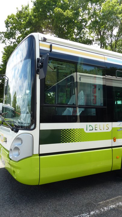 Photo d'un bus avec la livrée IDELIS au dépot de la STAP à Pau